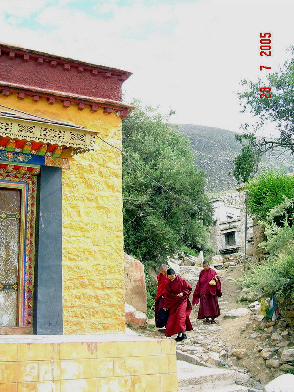 Монастырь Дрепунг около Лхаса в Тибете